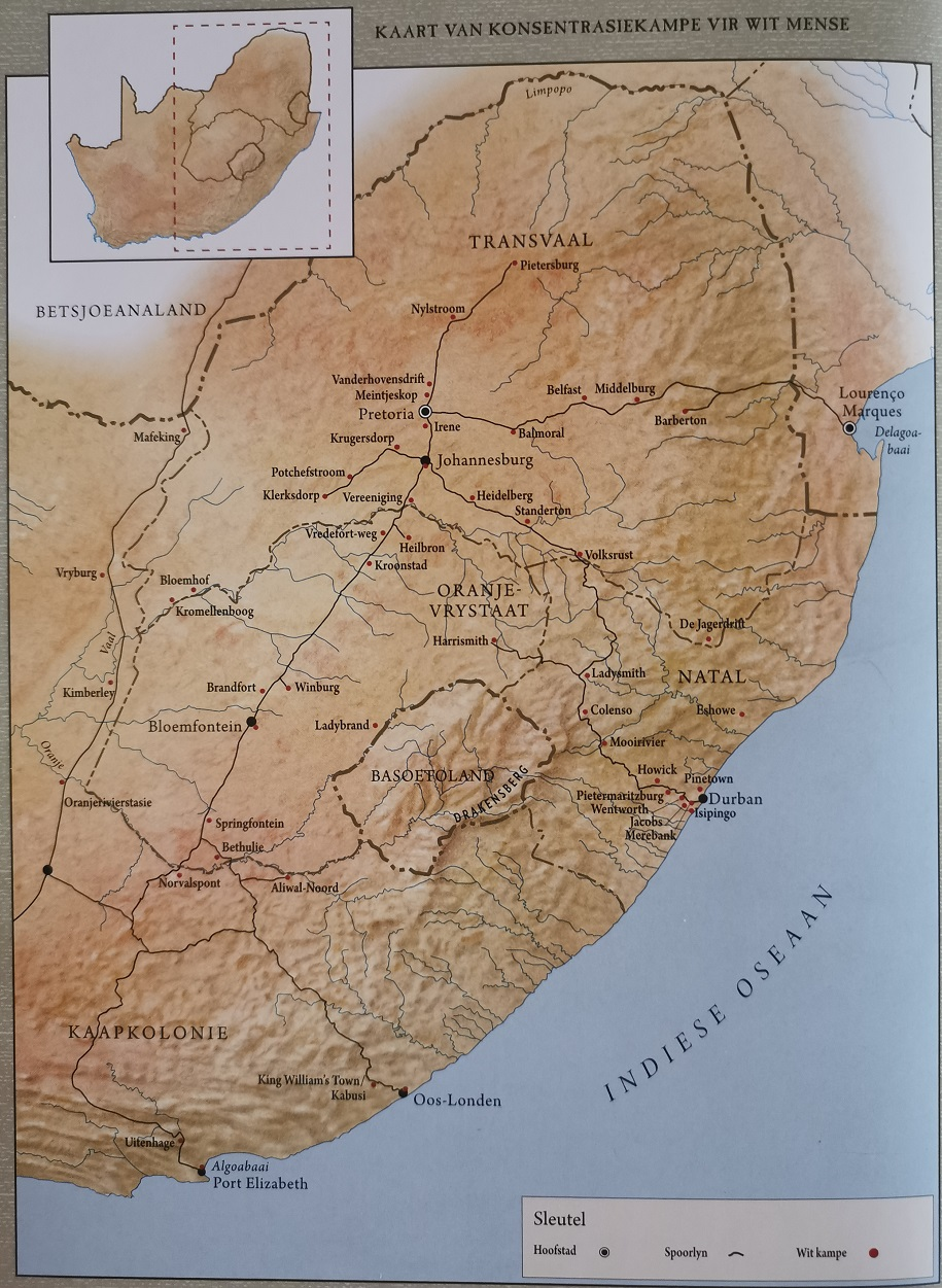 Krediet: Pretorius, F. (red.). 2017. Verskroeide Aarde. Tafelberg Uitgewer: Kaapstad